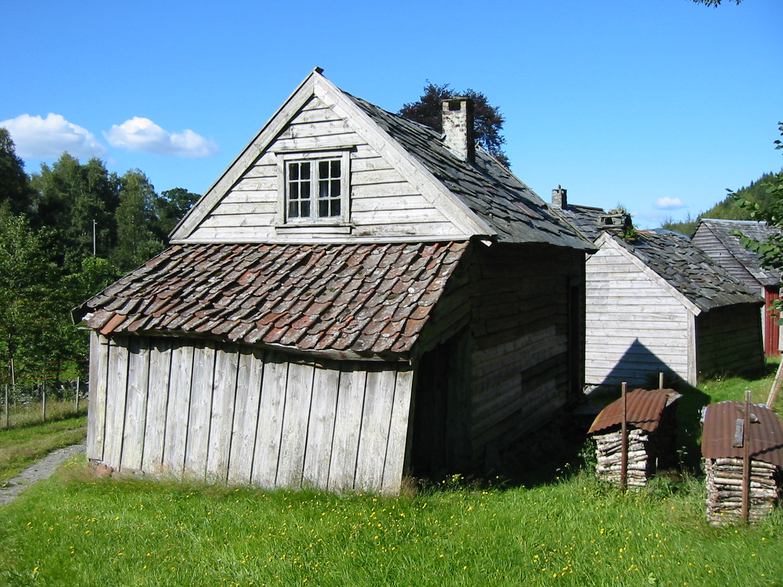 Fra Vigatunet, Hjelmeland. Bygninger fra 1800-tallet.